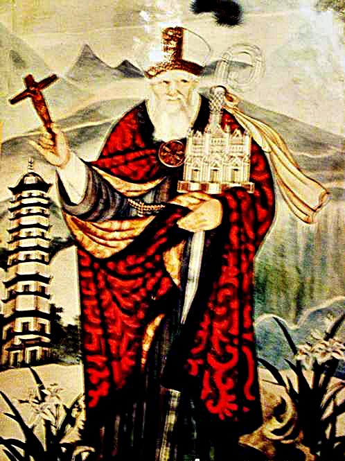 Giovanni (John) der Marignolli, Bischof und päpstlicher Legat in China, Indien